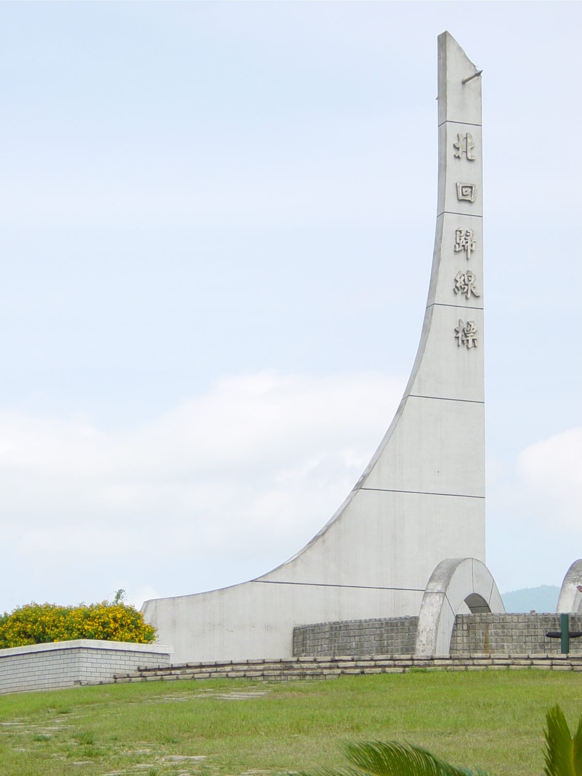 花蓮縣瑞穗鄉北回歸線標誌碑。